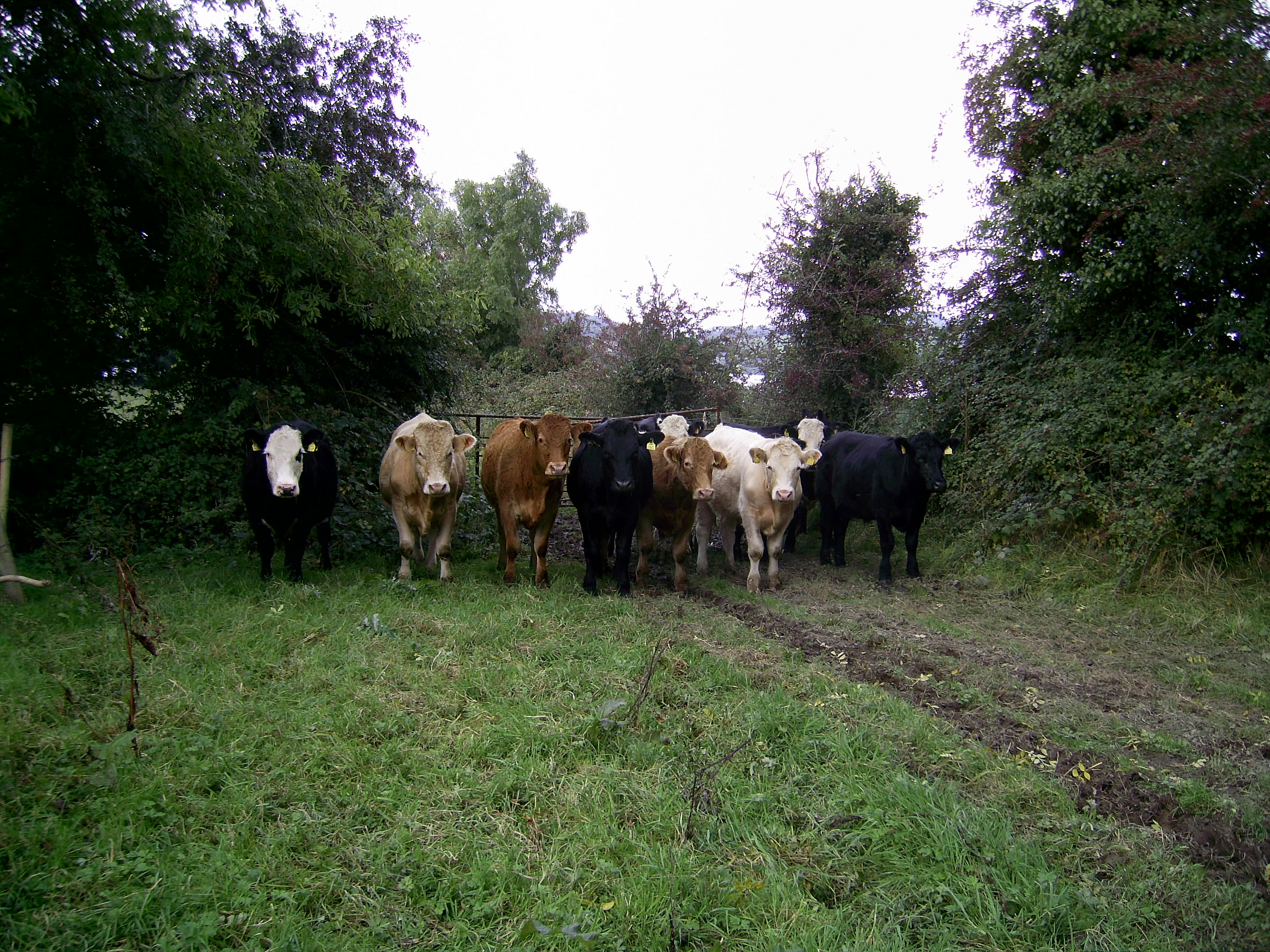 Génisse_de_Mullingar.JPG